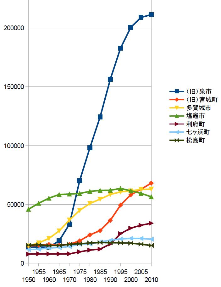 仙塩地区の自治体の国勢調査人口（1950年～2010年）